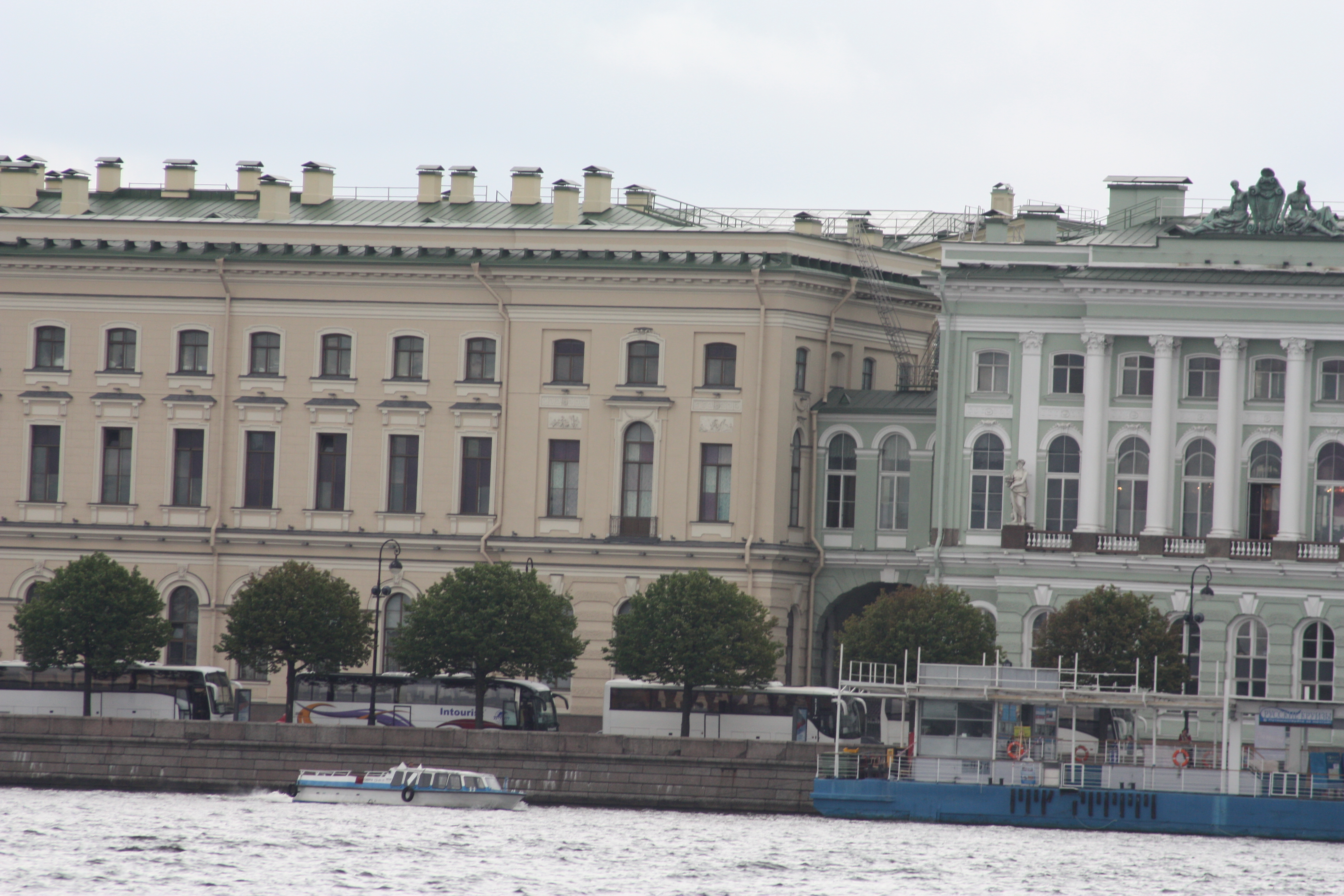 Sankt Petersburg; 2009; Touristenfotos